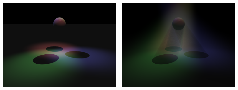 Światło wolumetryczne (obrazki wykonane w POV-Ray)